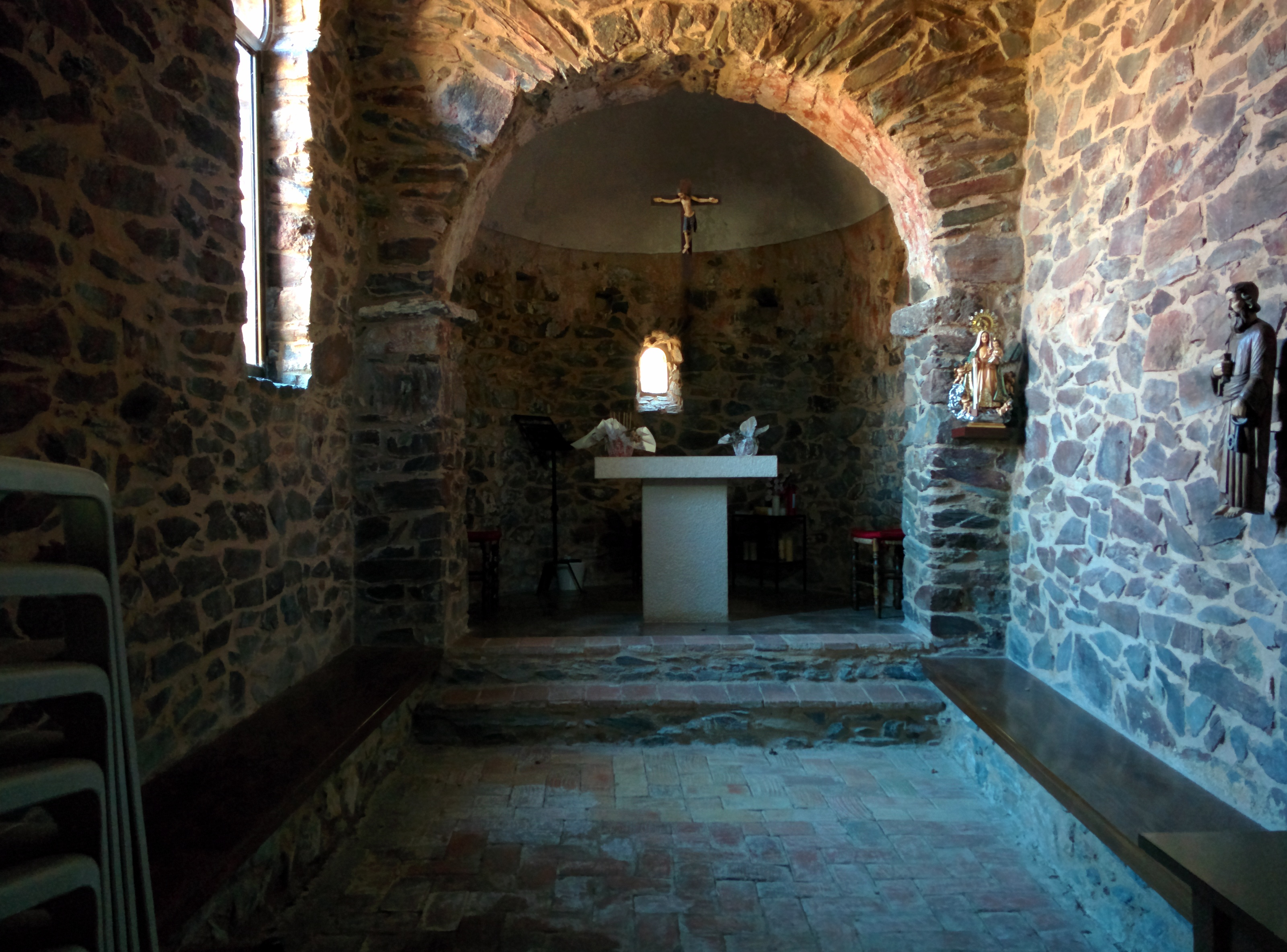 Ermita de Sant Pere Sestronques (Anglès)